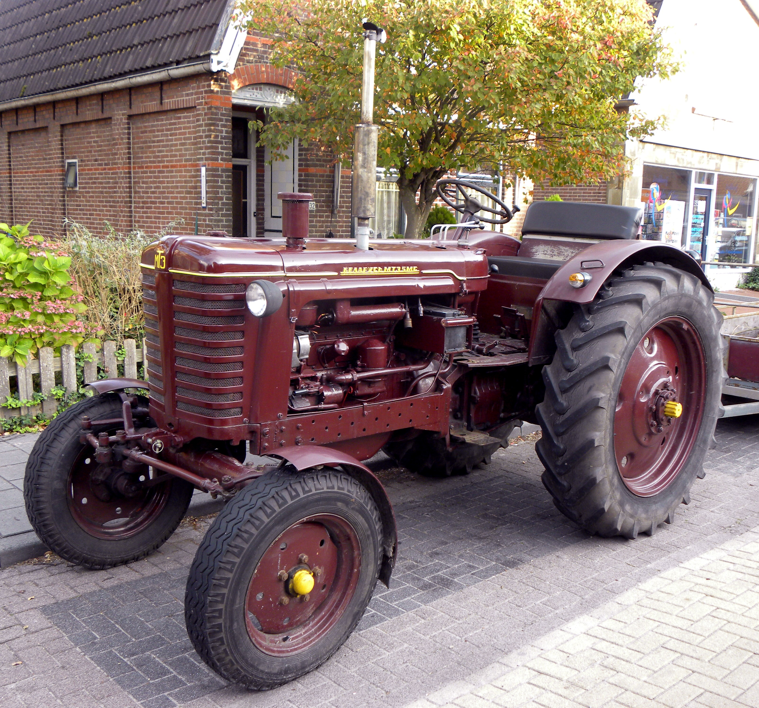 Belarus MT 35 MG